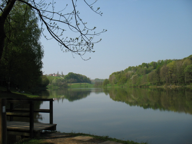 Blaguško jezero